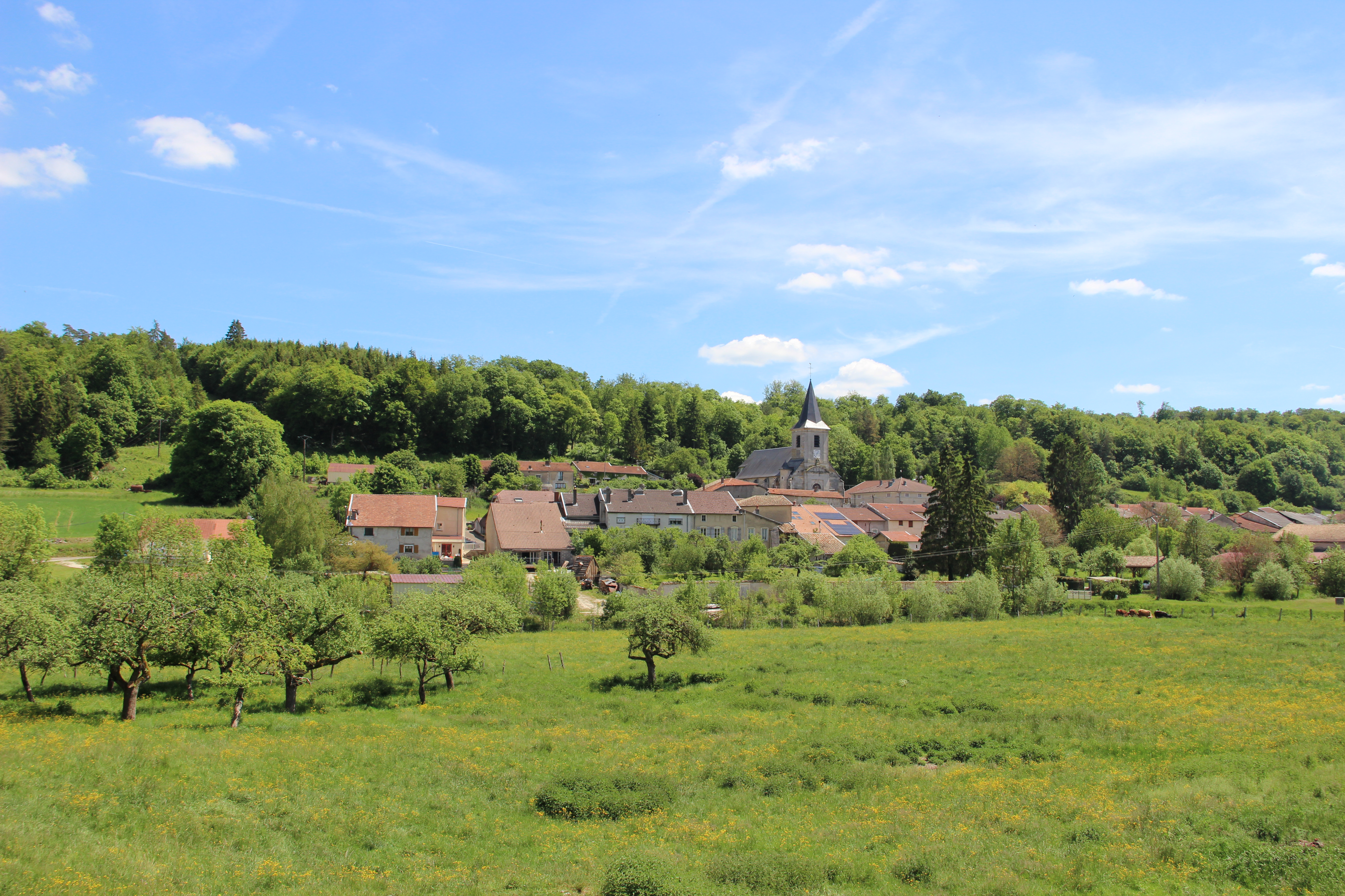 Aperçu du village